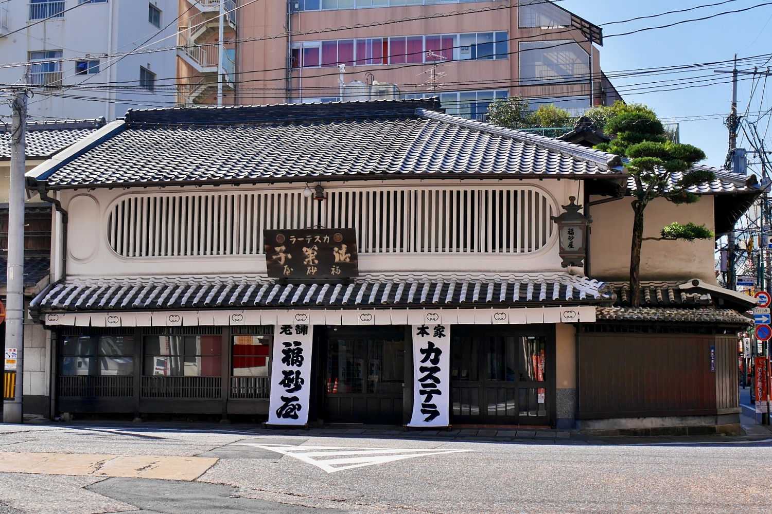 カステラ製造・販売業者「福砂屋」の長崎本店（長崎県長崎市）